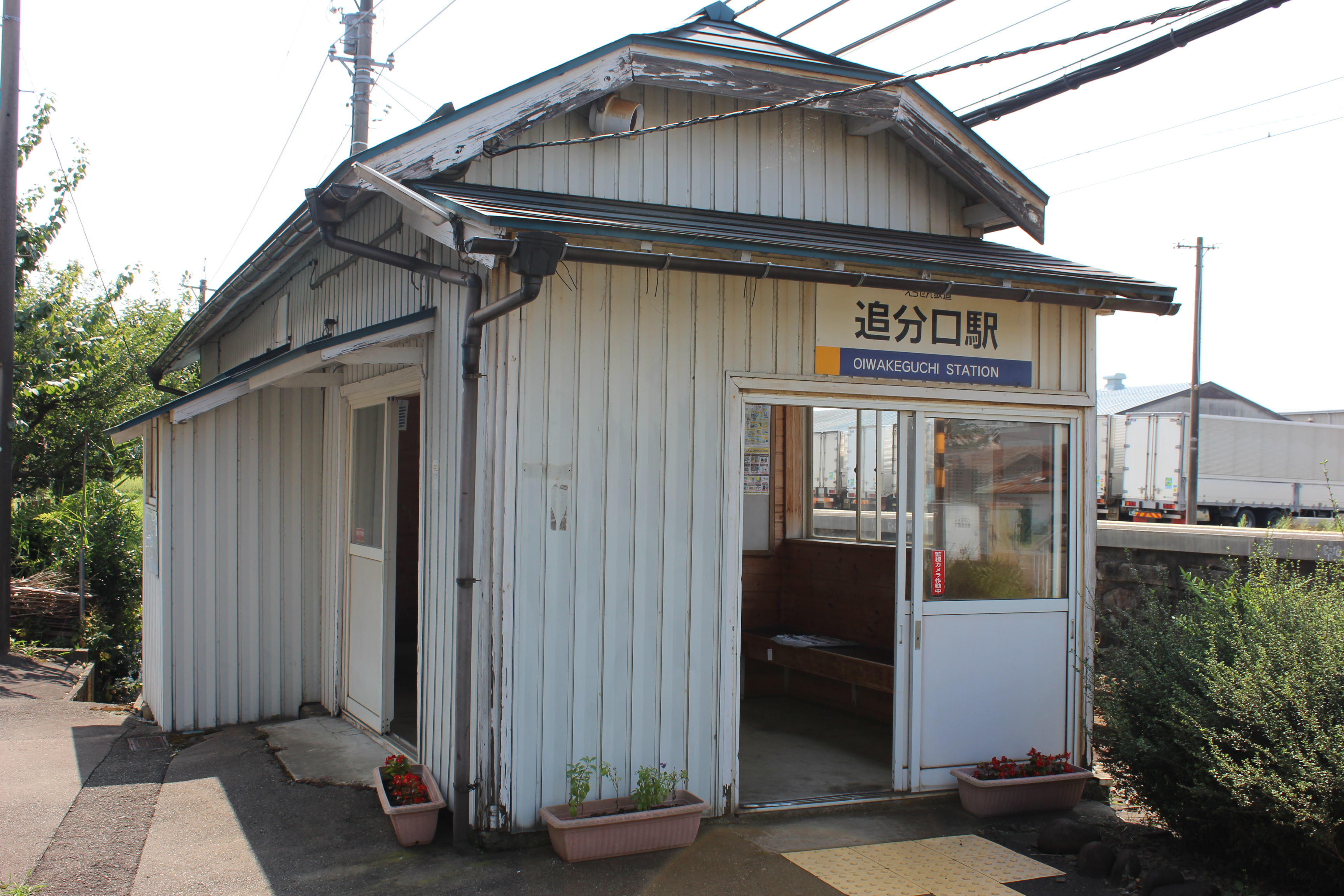 えちぜん鉄道勝山永平寺線追分口駅